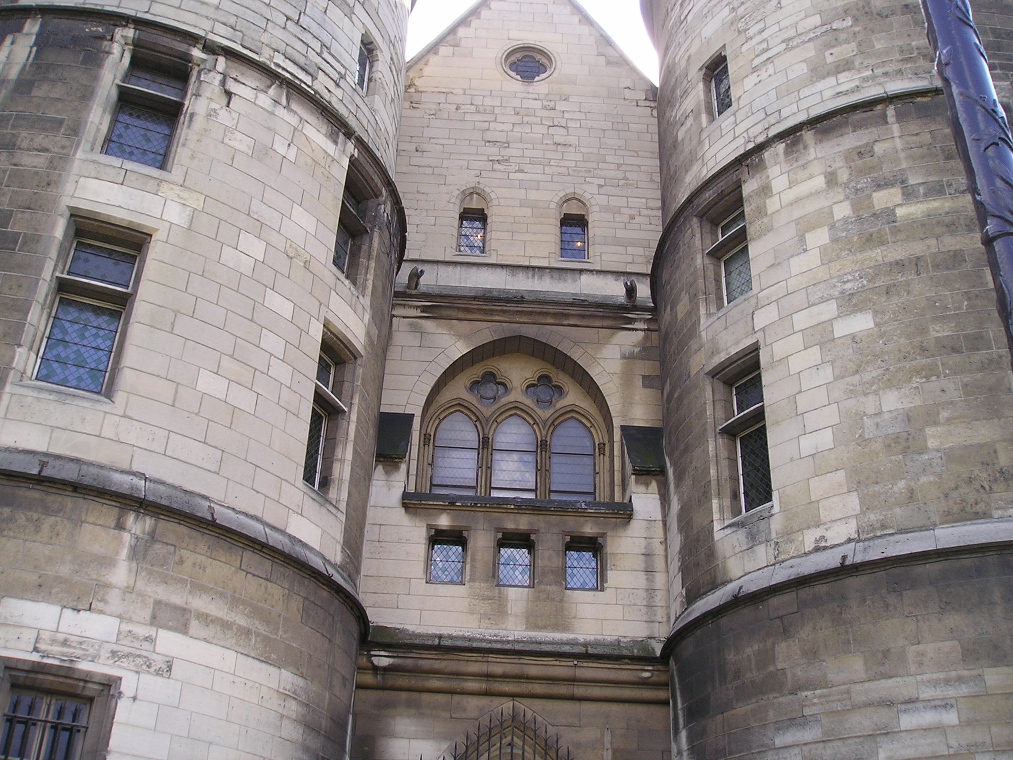 Conciergerie close-up